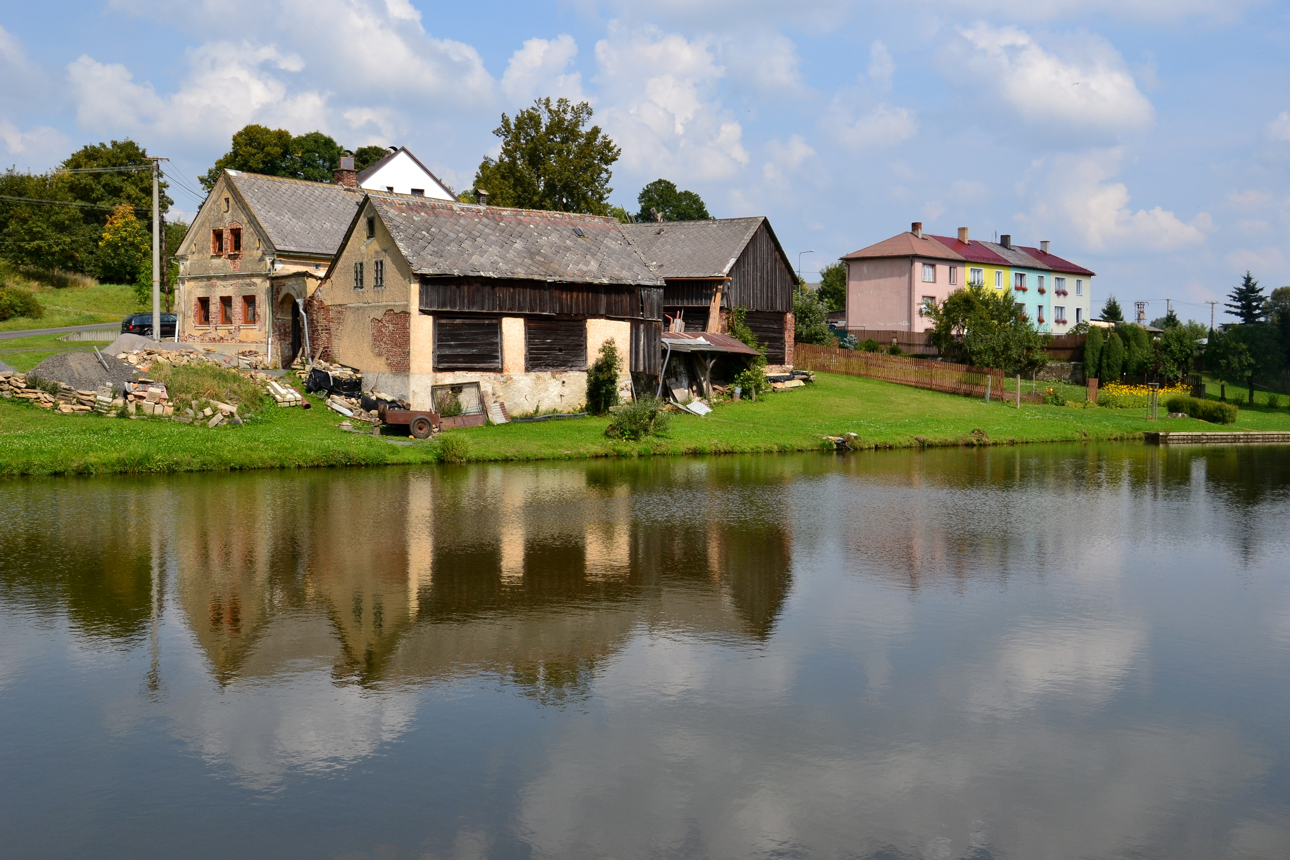 Rybník a statek čp. 12